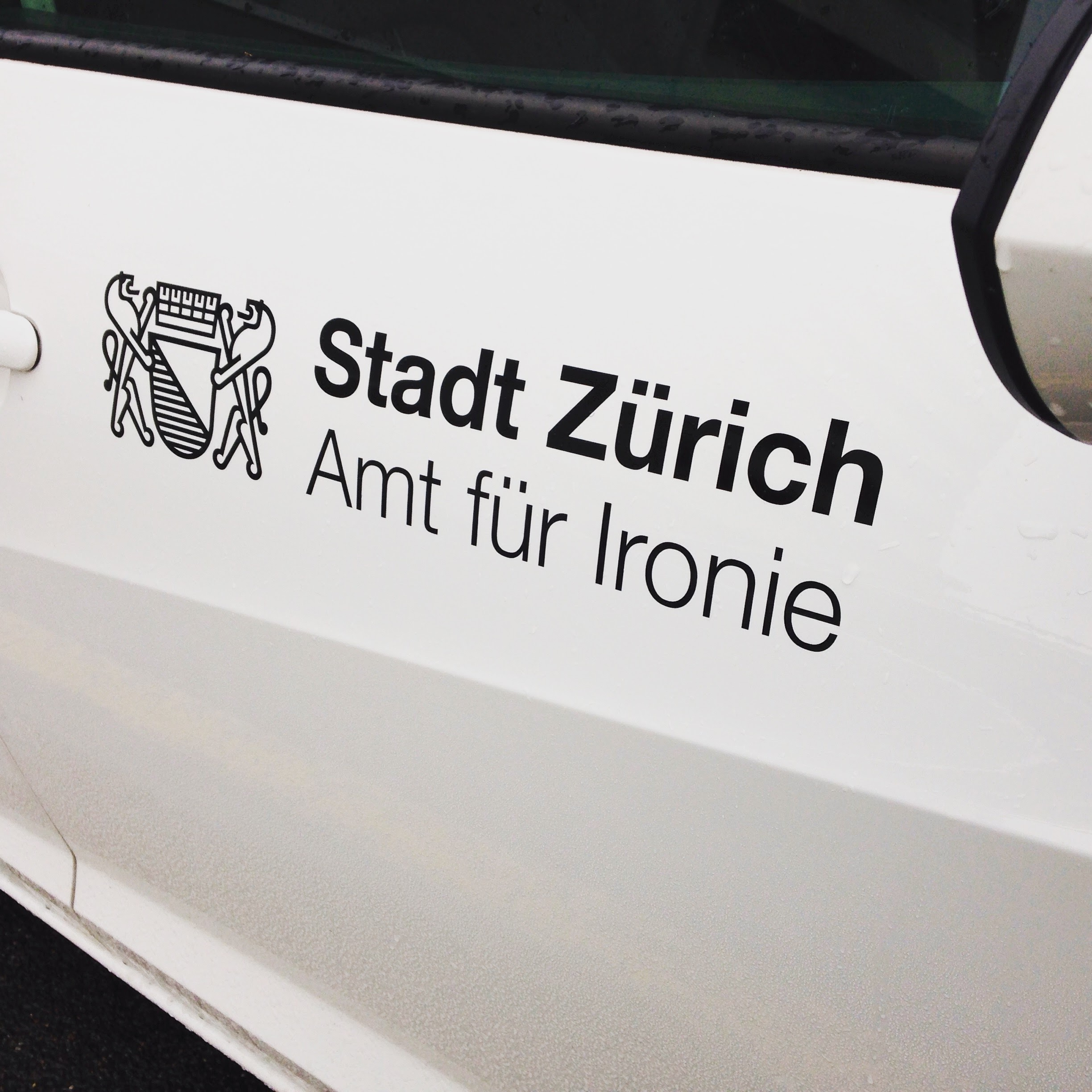 Der Schweizer Schriftsteller Thomas Meyer hat sein Auto mit einer amtlichen Aufschrift versehen. Aufgrund der Gesetzgebung konnte ihm die Stadt Zürich dies nicht untersagen.